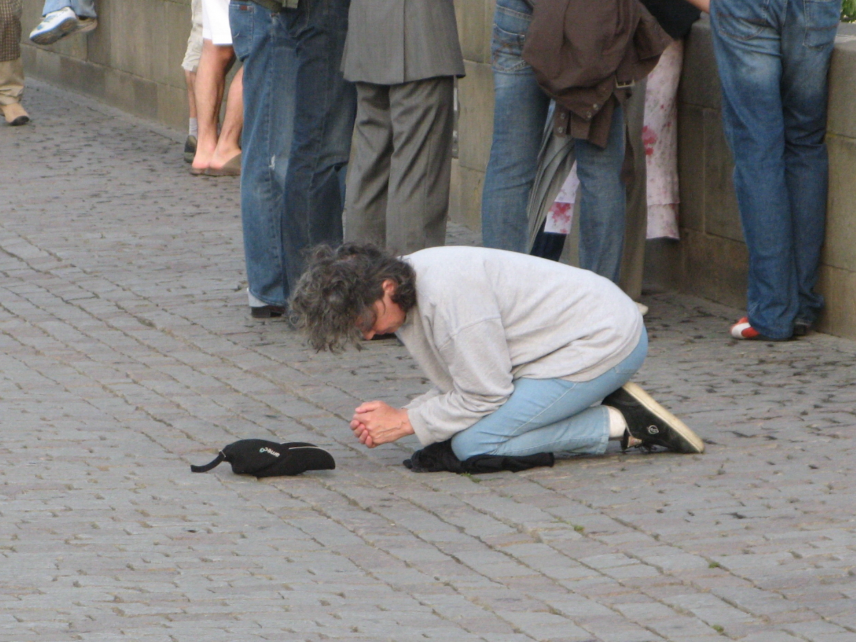 Beggar in Prague